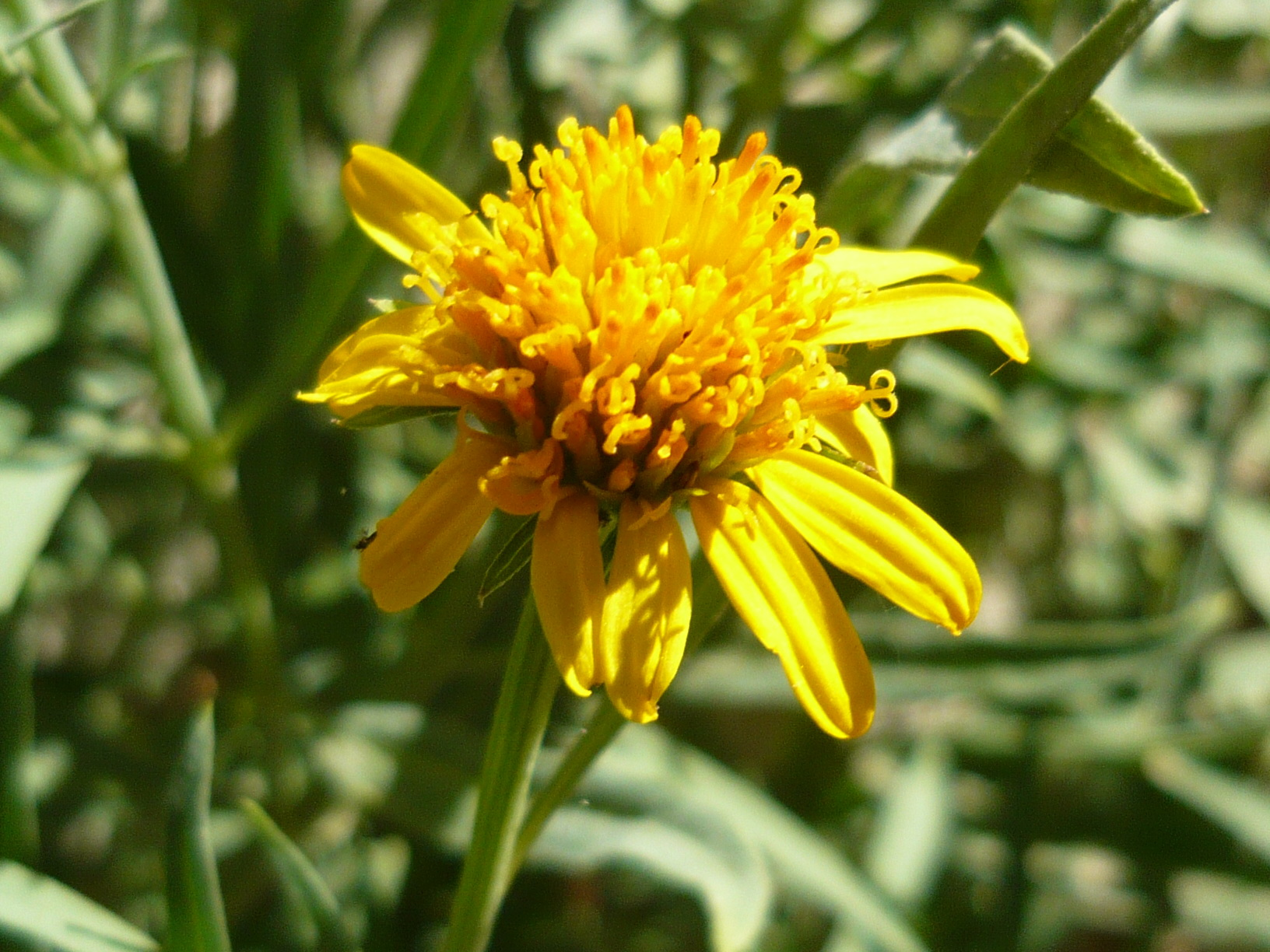 Wedelia glauca, subespontánea. Real Jardín Botánico de Madrid.